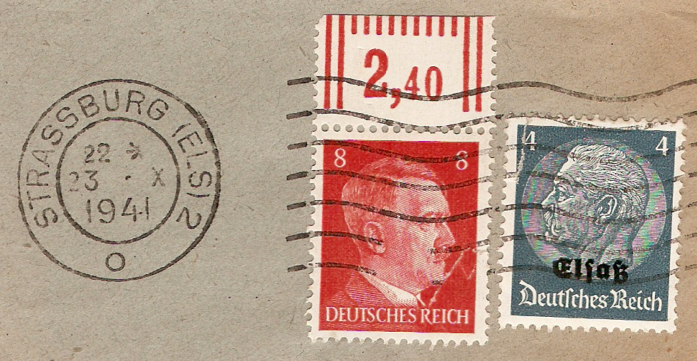 Fragment de lettre avec 2 timbres allemands utilisés en Alsace (Strasbourg) en 1942